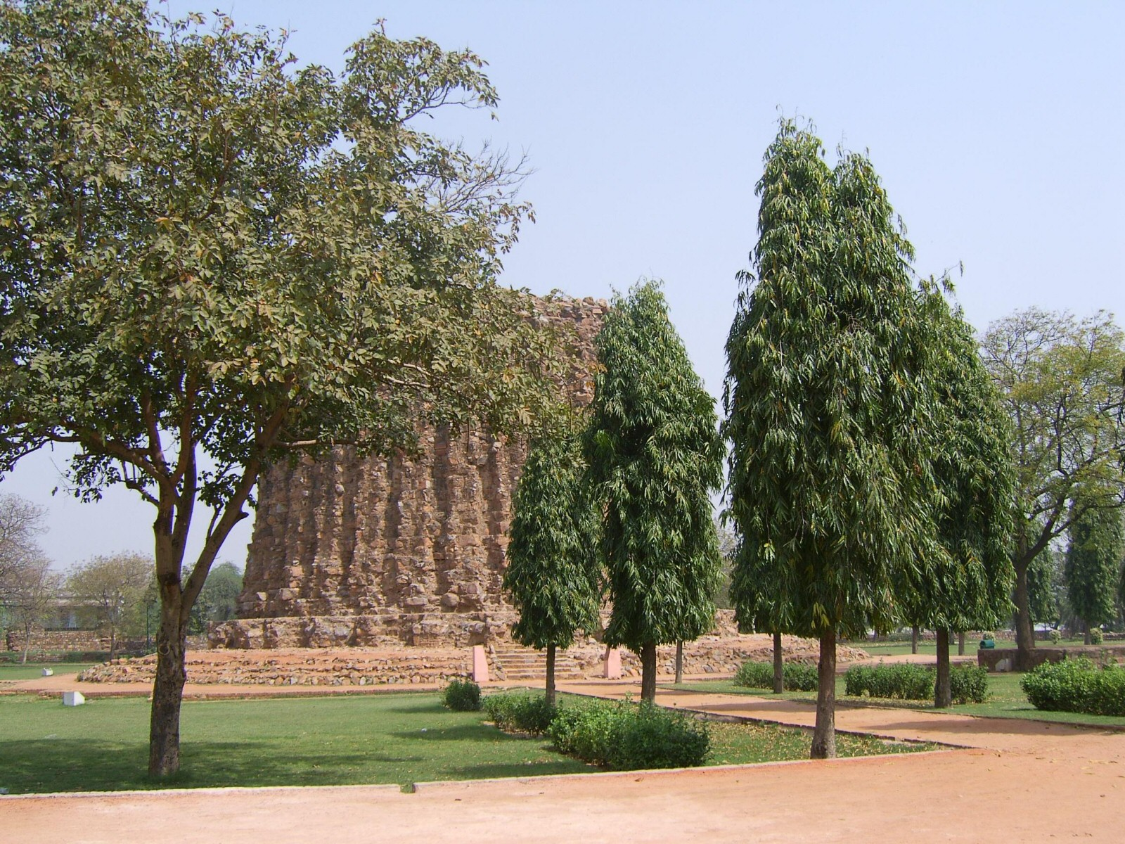 Restos del Alai Minar construido por Alaudín. Qutb complex. Source: Photo taken by User:~shuri